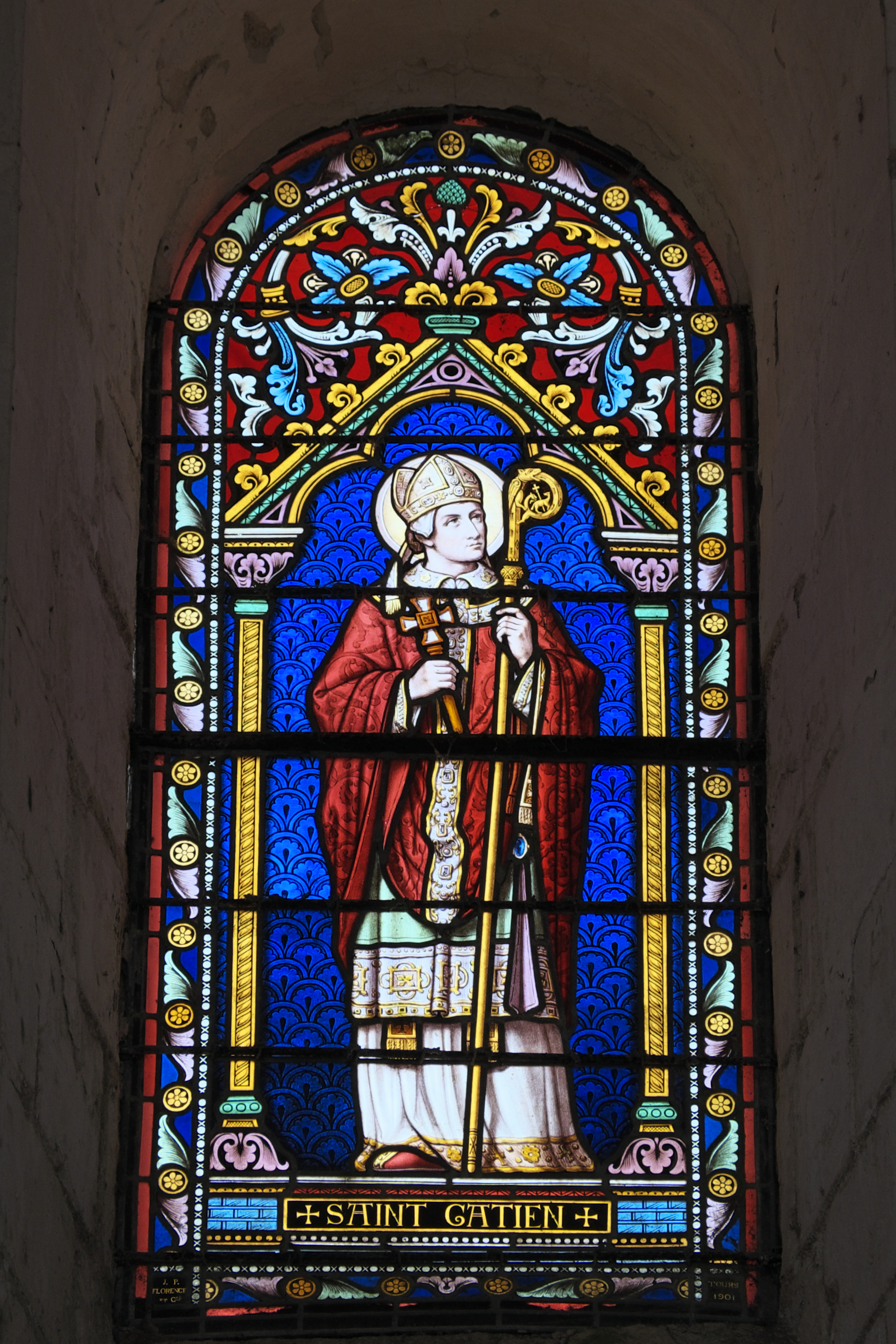 Katholische Pfarrkirche Notre-Dame in La Celle-Guenand im Département Indre-et-Loire (Centre-Val de Loire/Frankreich), Bleiglasfenster: Darstellung: Heiliger Gatianus